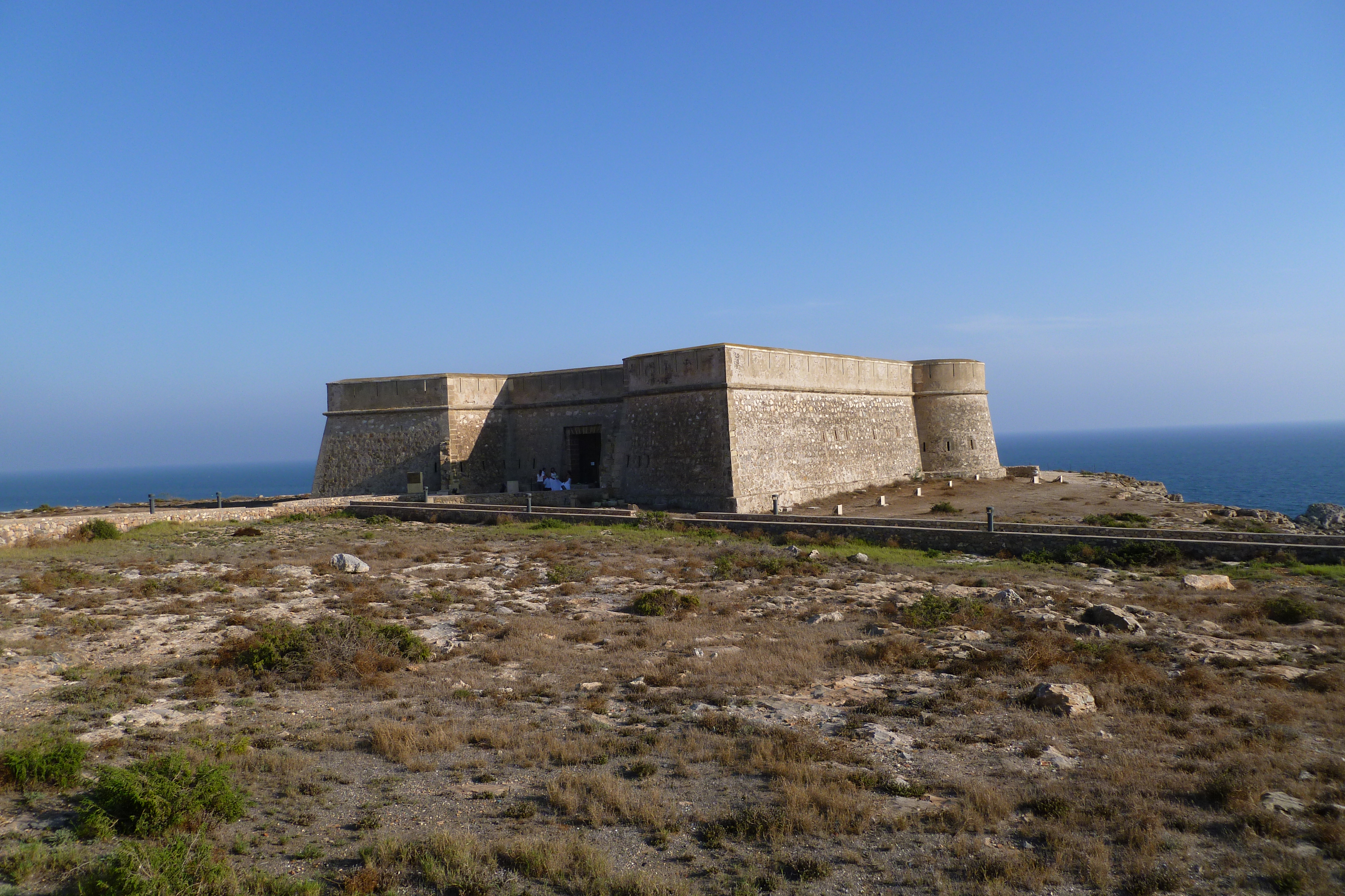 Castelo de Guardas Viejas, El Ejido, Espanha.